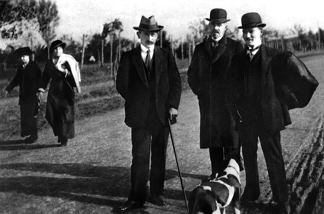 Kurmay Yarbay Mustafa Kemal (Atatürk) arkadaşlarıyla, Sofya, Bulgaristan, 1914